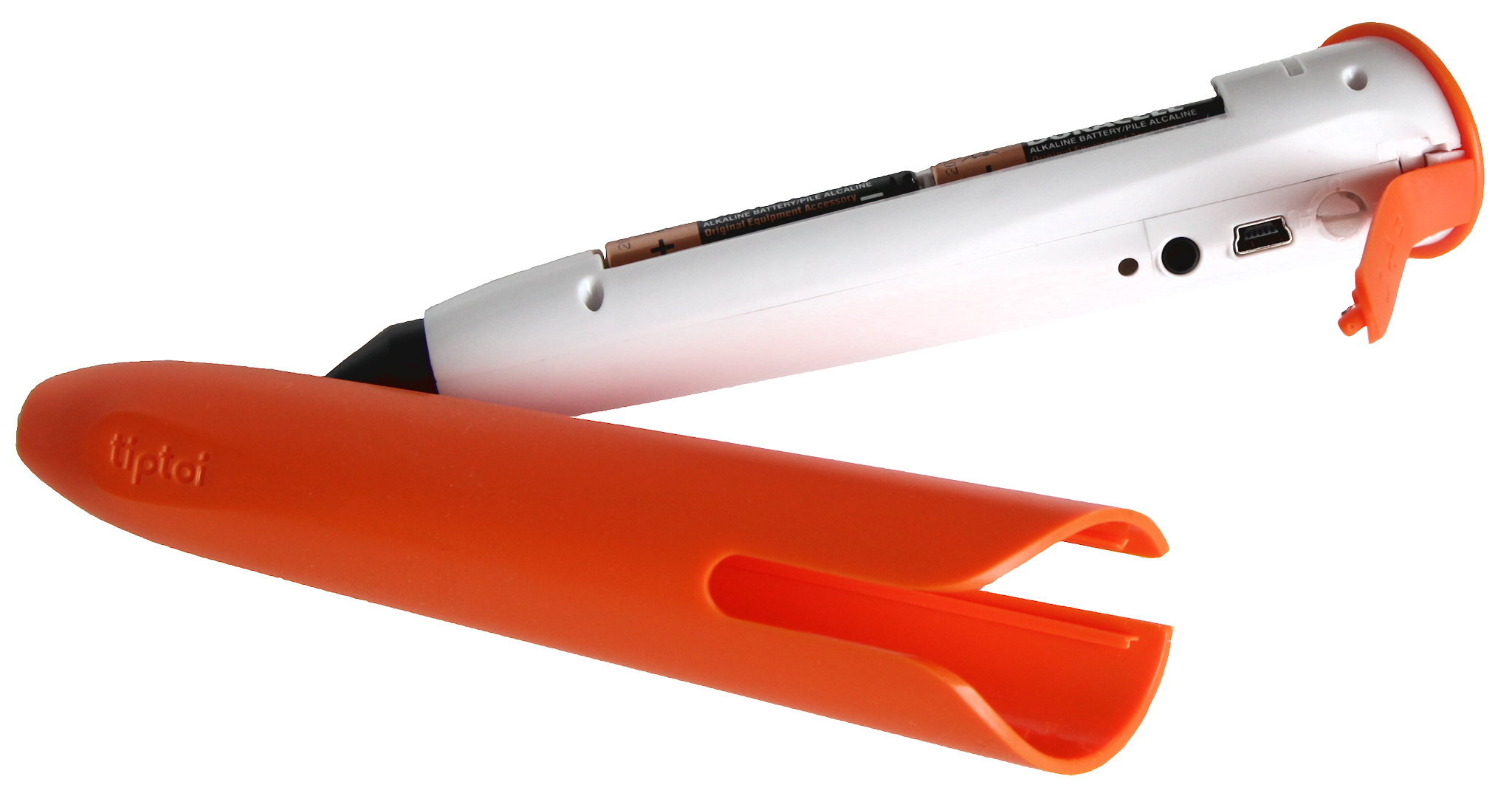 Tiptoi Stift geöffnet